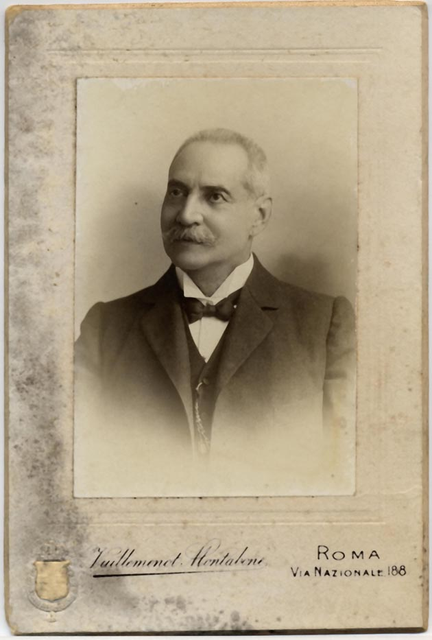 Francesco Cannas